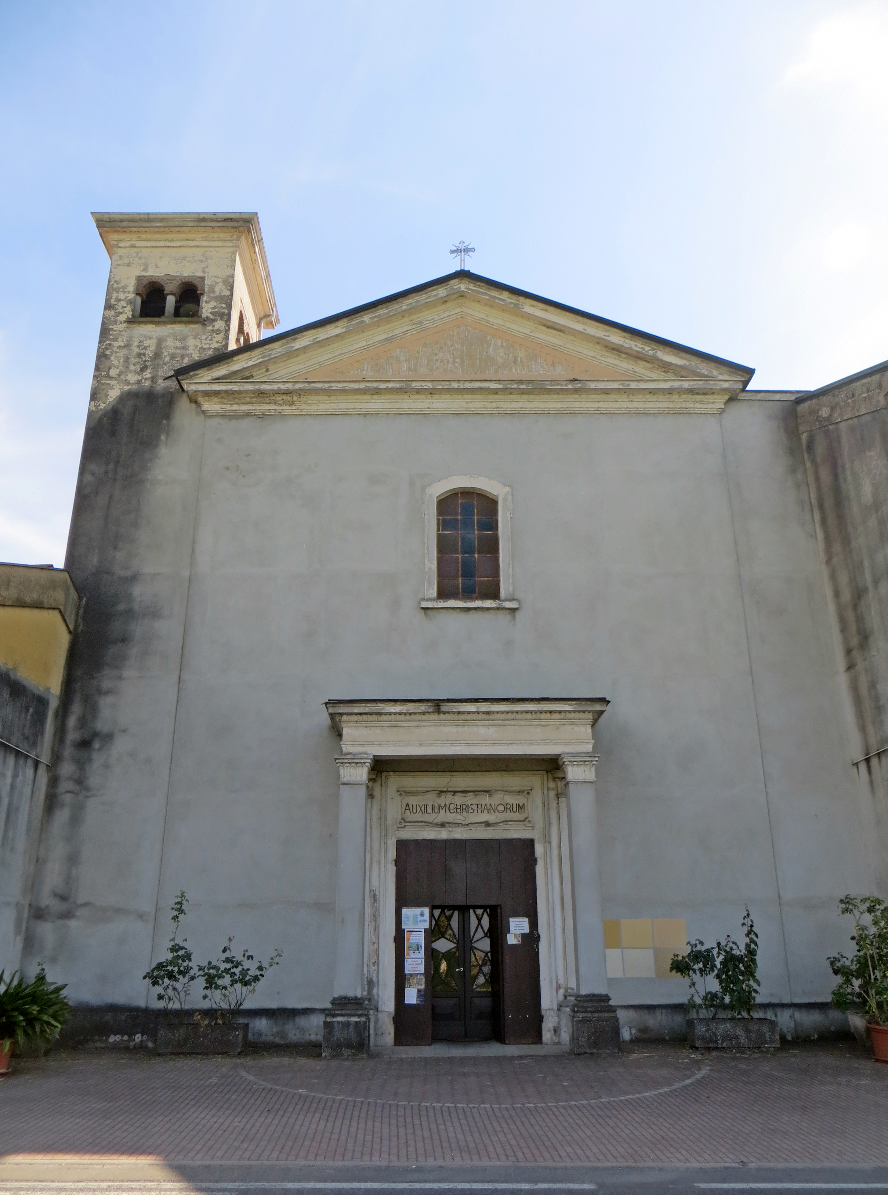 Convento di Santa Maria delle Grazie (Montechiarugolo) - facciata del santuario